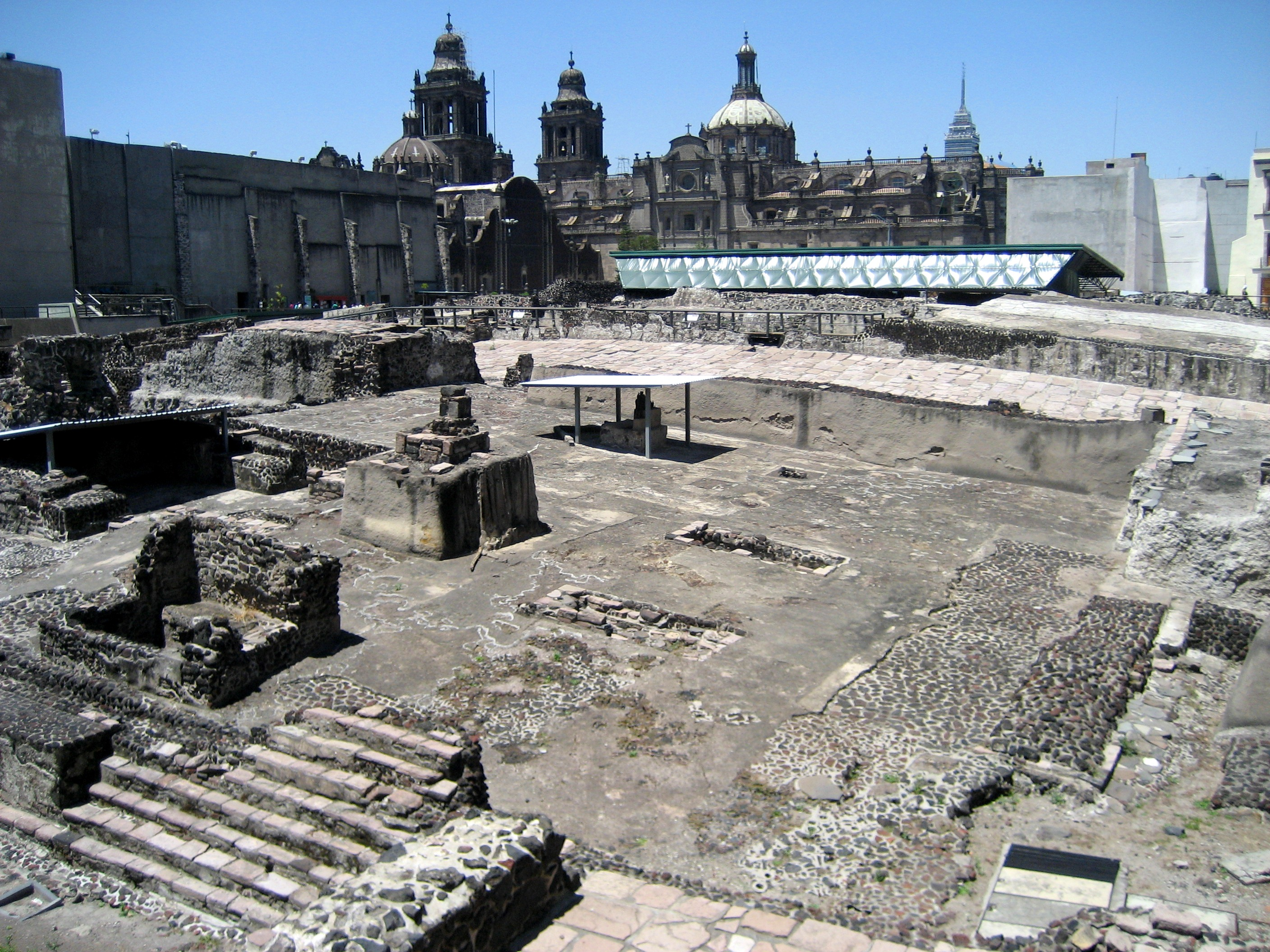 Zona arqueológica Templo Mayor en el Centro Histórico de la Ciudad de México